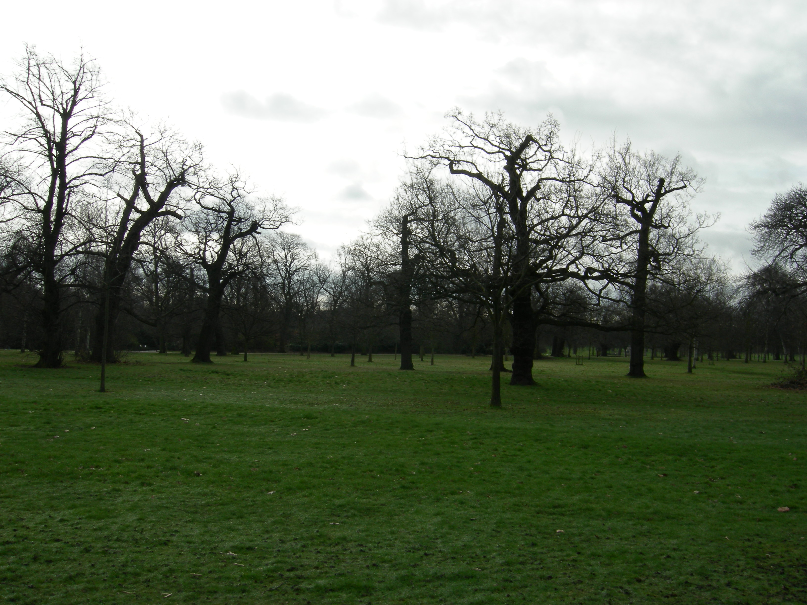 Trees of Hyde Park